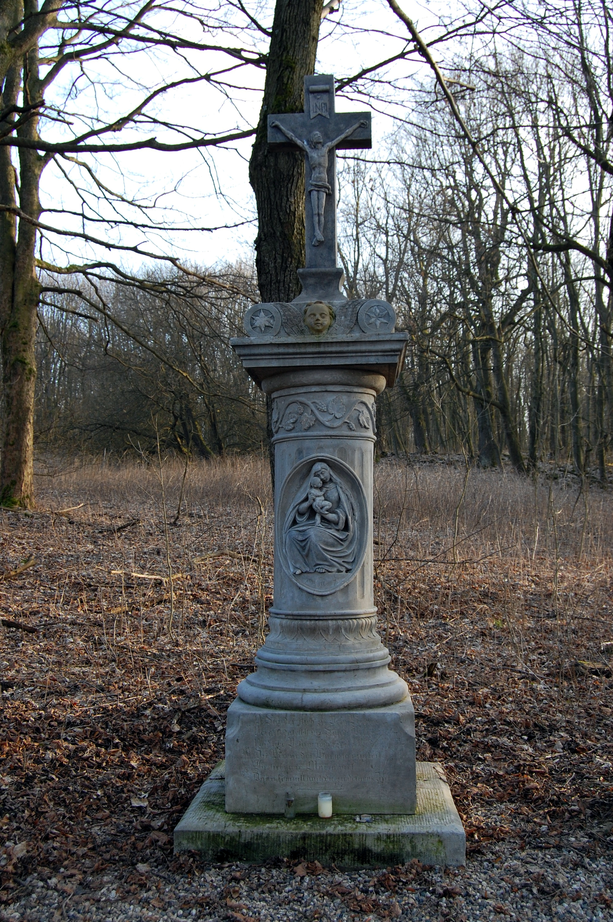 Kříž ve Větrově u Krásného Lesa v Krušných horách